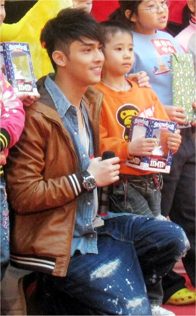 Kelvin Kwan 2008